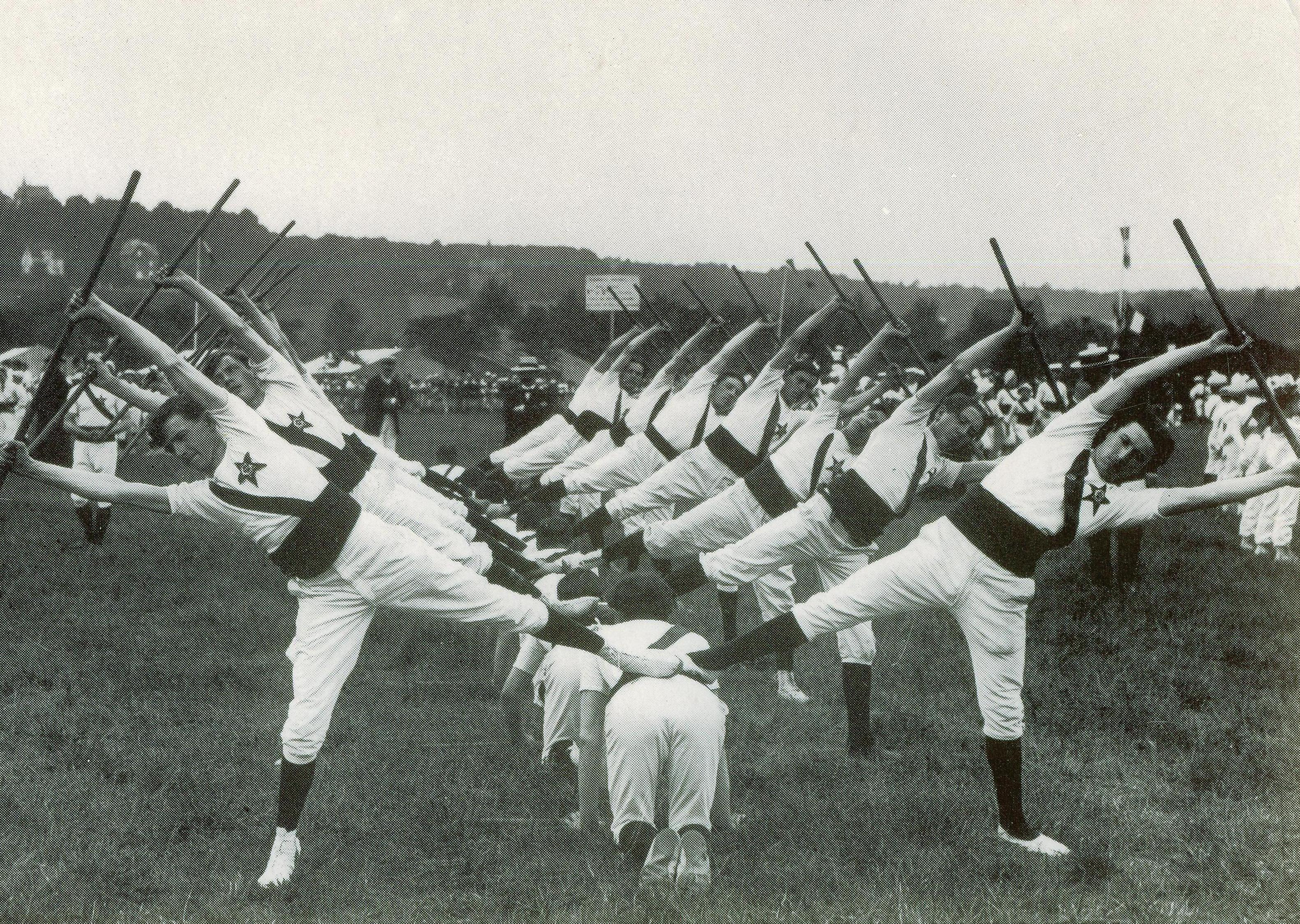 Concours régional de Seine-et-Oise en 1914 de la Fédération gymnastique et sportive des patronages de France (FGSPF), équipe championne.